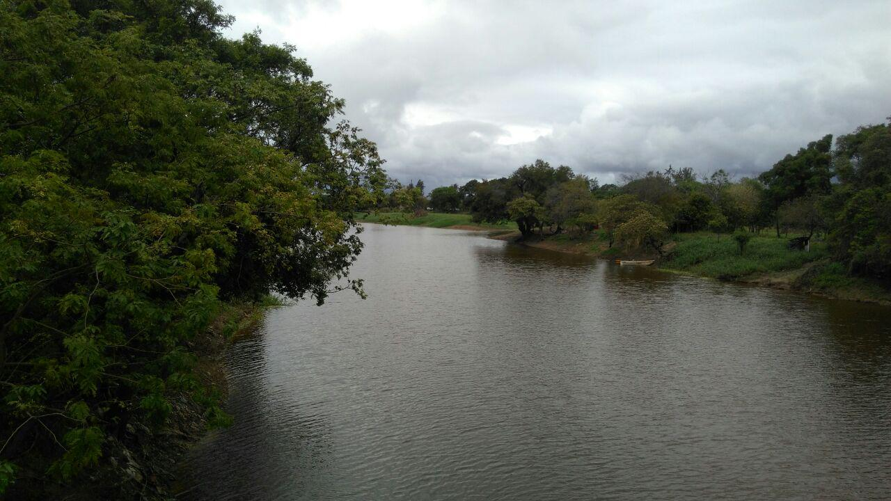 Vista del río Pilcomayo desde el Puente San Ignacio de Loyola hacia la desembocadura